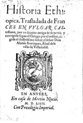 Portada de la Historia Etiópica de Heliodoro de Émasa, publicada en Amberes en 1554